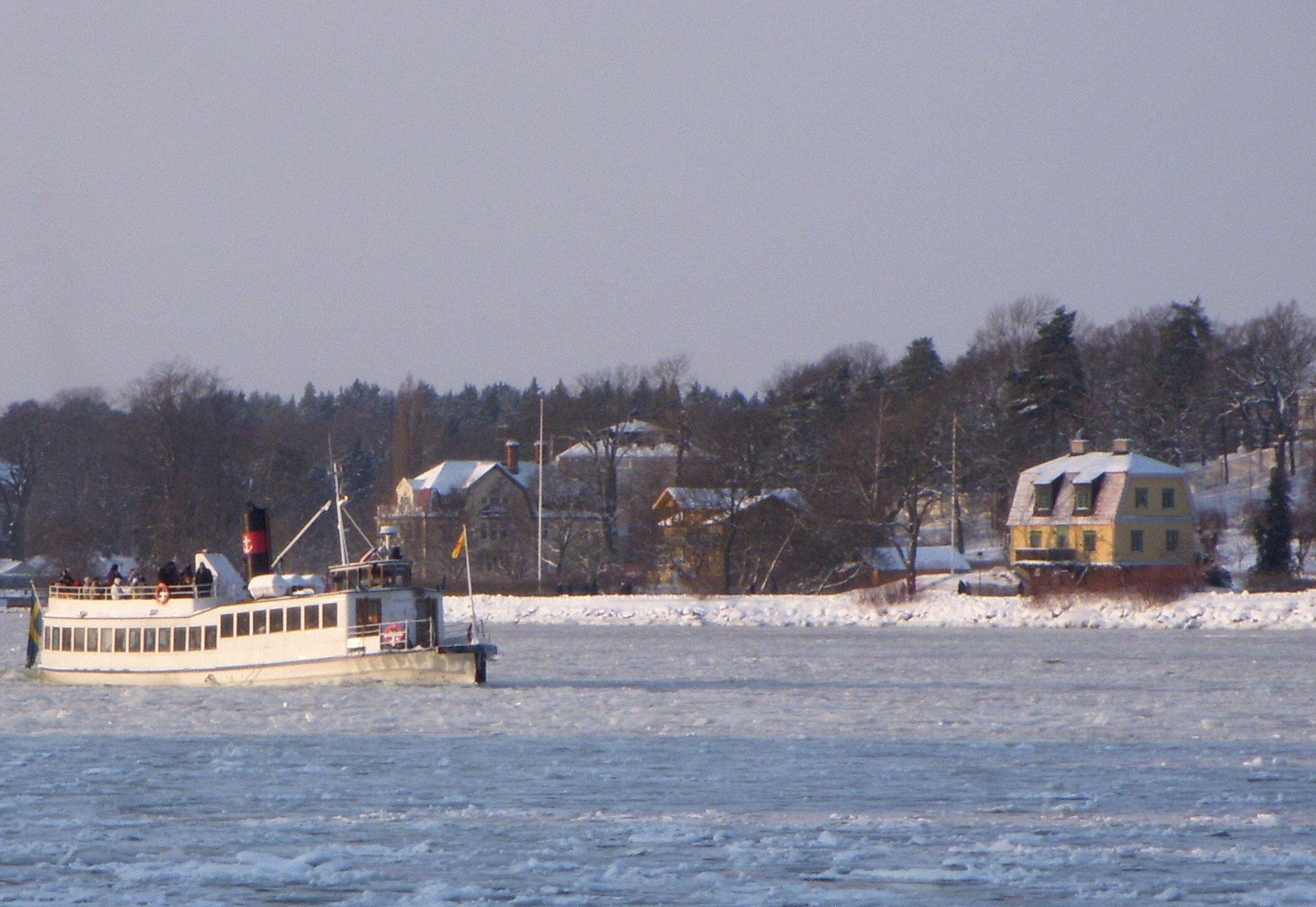 Sjöstugan på Blockhusudden, även kallad "Stora Sjötullen 3"